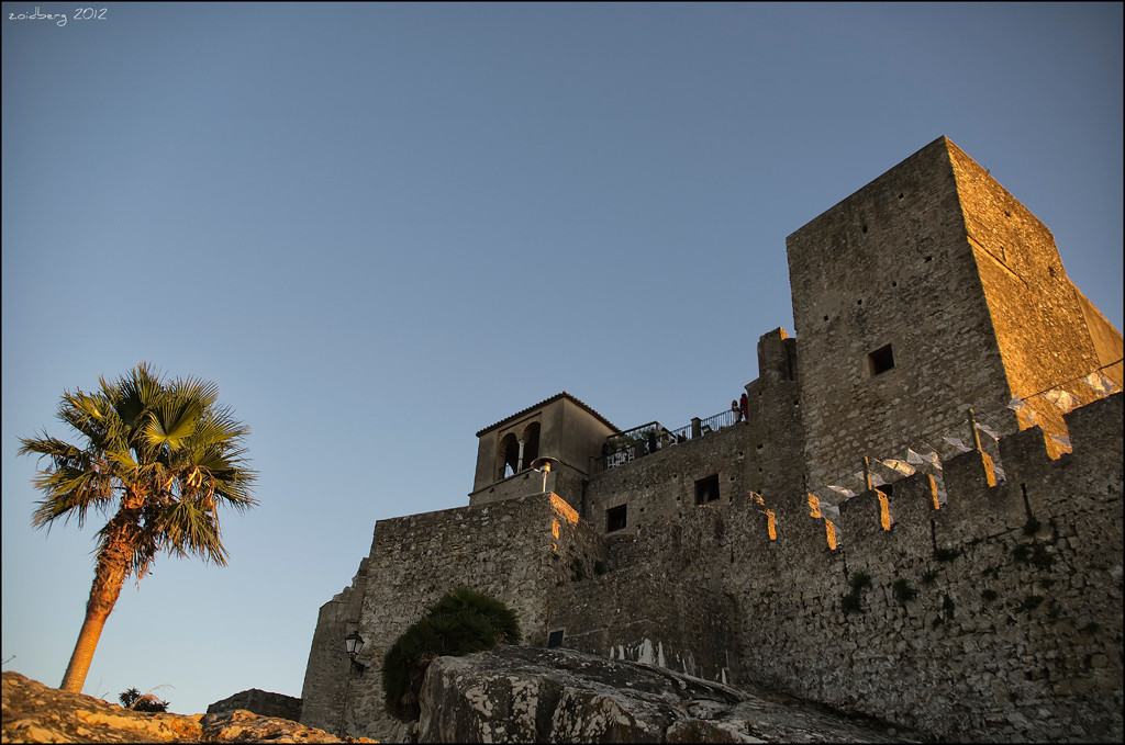 Castillo de Castellar